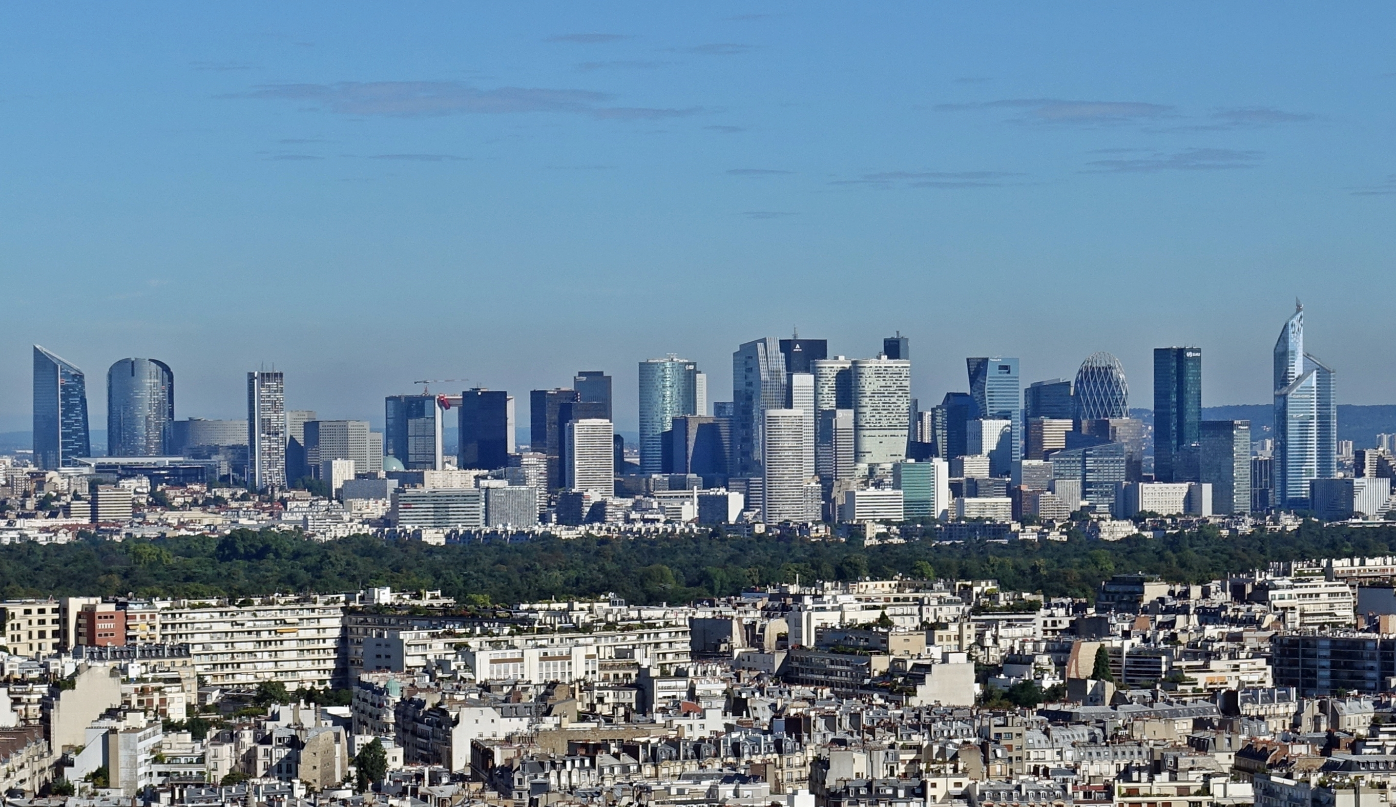 La Défense @ Ballon de Paris @ Parc André Citroën @ Paris